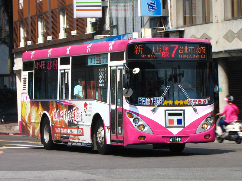 臺北客運大客車411-FE